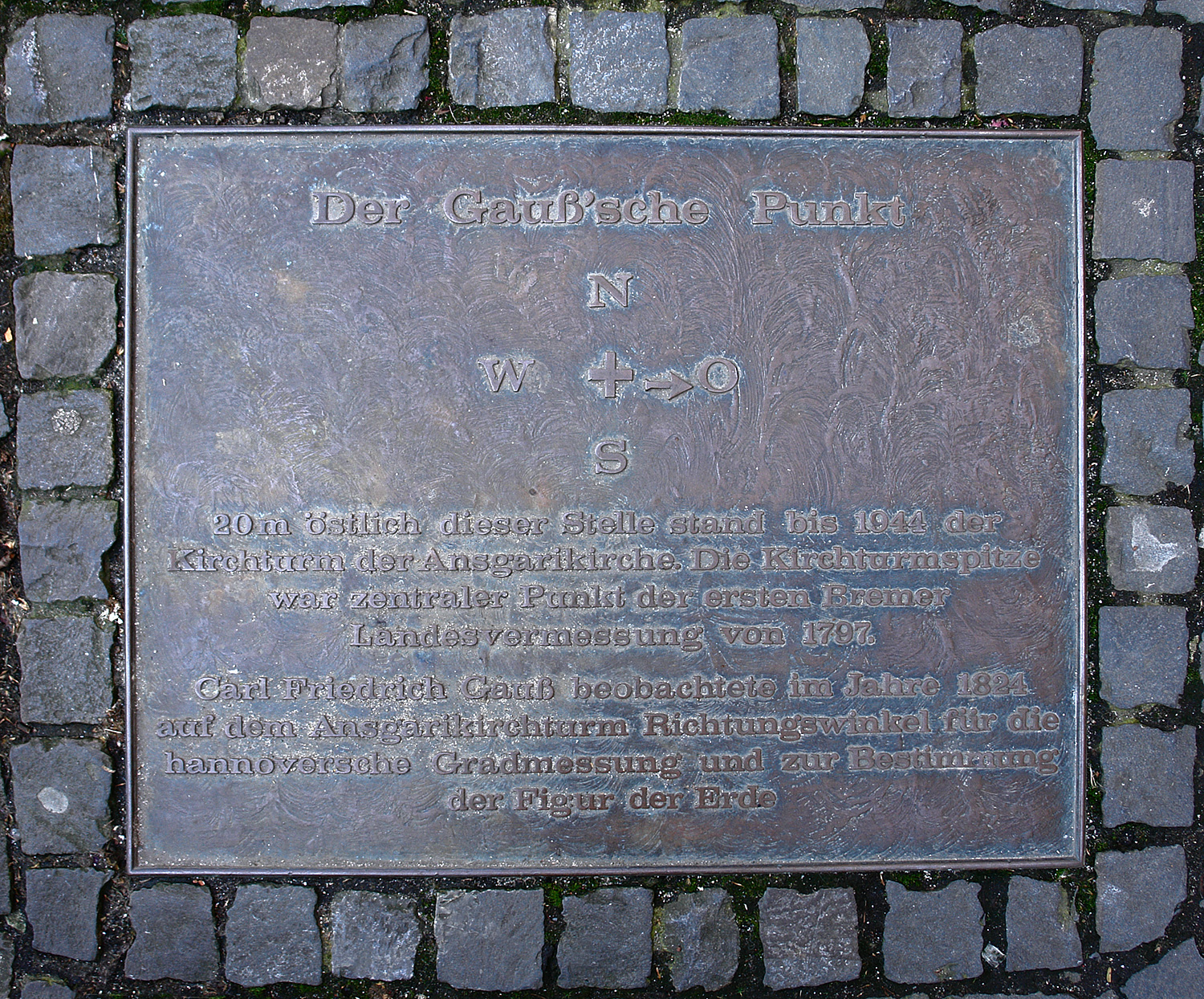 Der Gauß'scher Punkt in Bremen